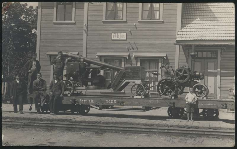 Abja raudteejaam, pildil vana 1944. aastal hävinud jaamahoone. This image on crowdsourcing geotagging platform Ajapaik